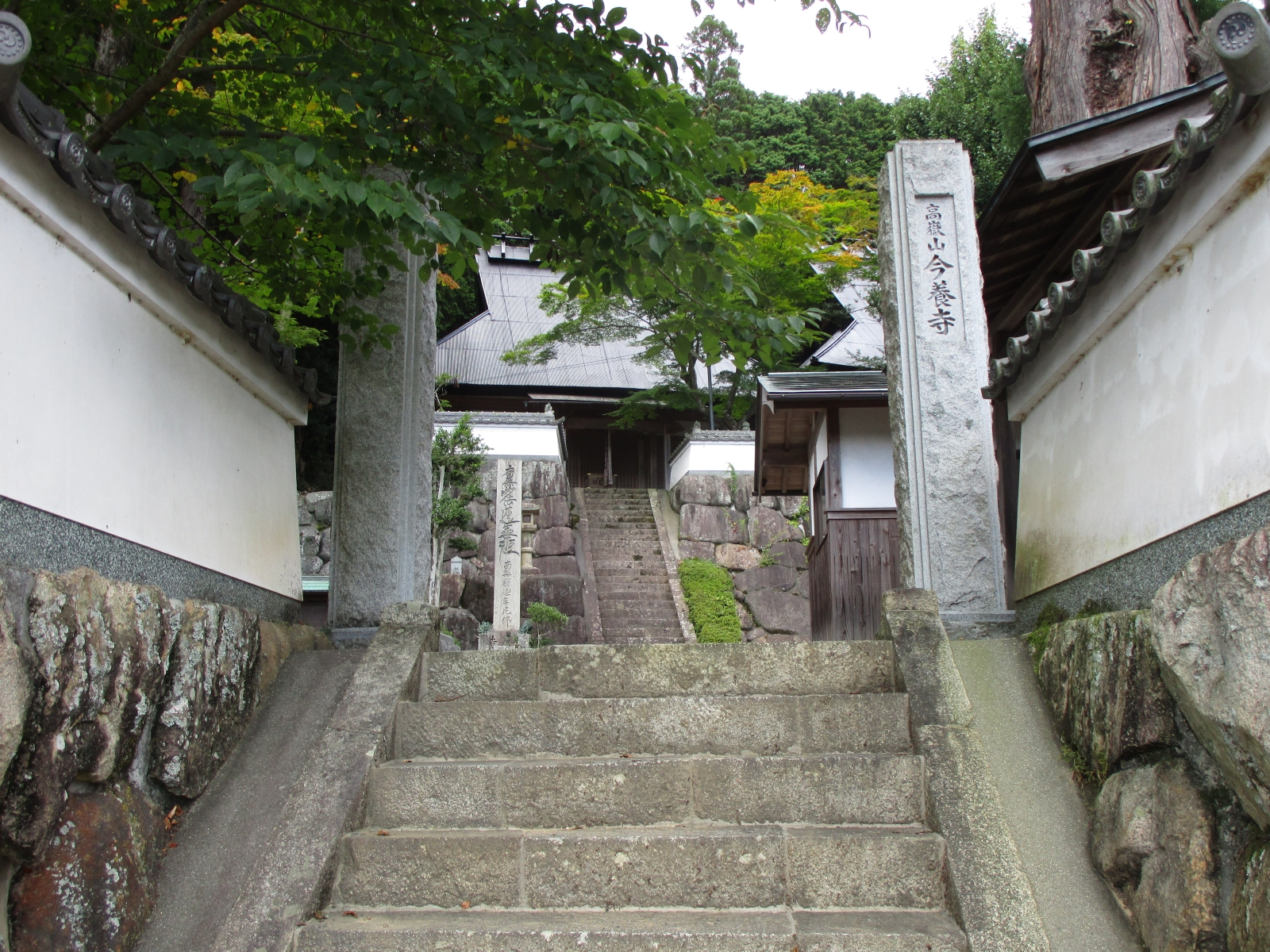 今養寺入り口